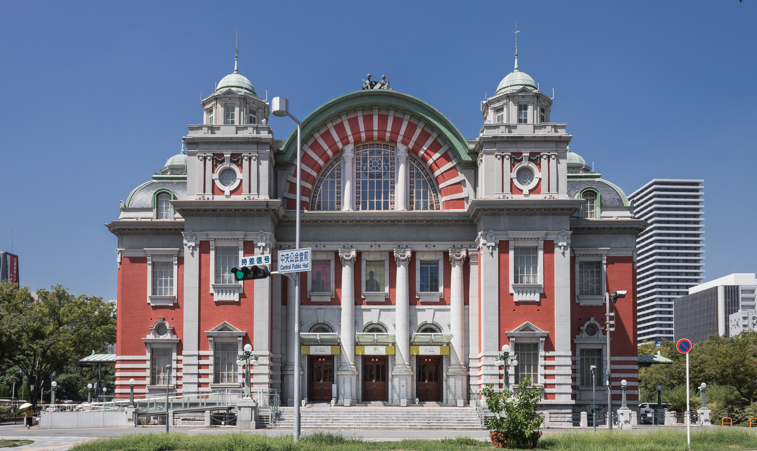 大阪市中央公会堂(重要文化財)、大阪市北区。